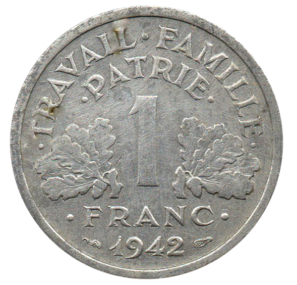 Revers 1 franc état français émise en 1942